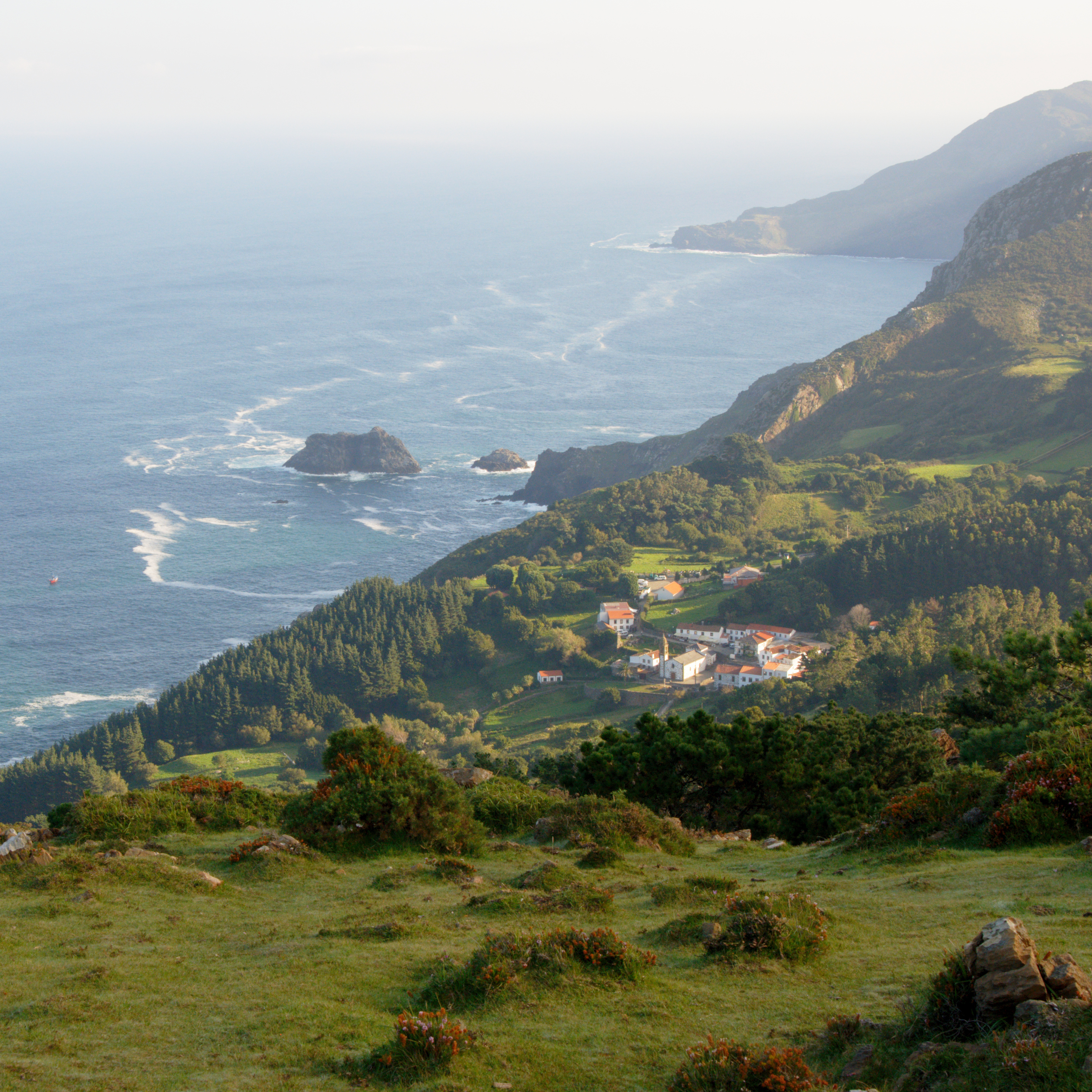 Blick vom Aussichtspunkt Miradoiro de San Andrés de Teixido auf den Wallfahrtsort